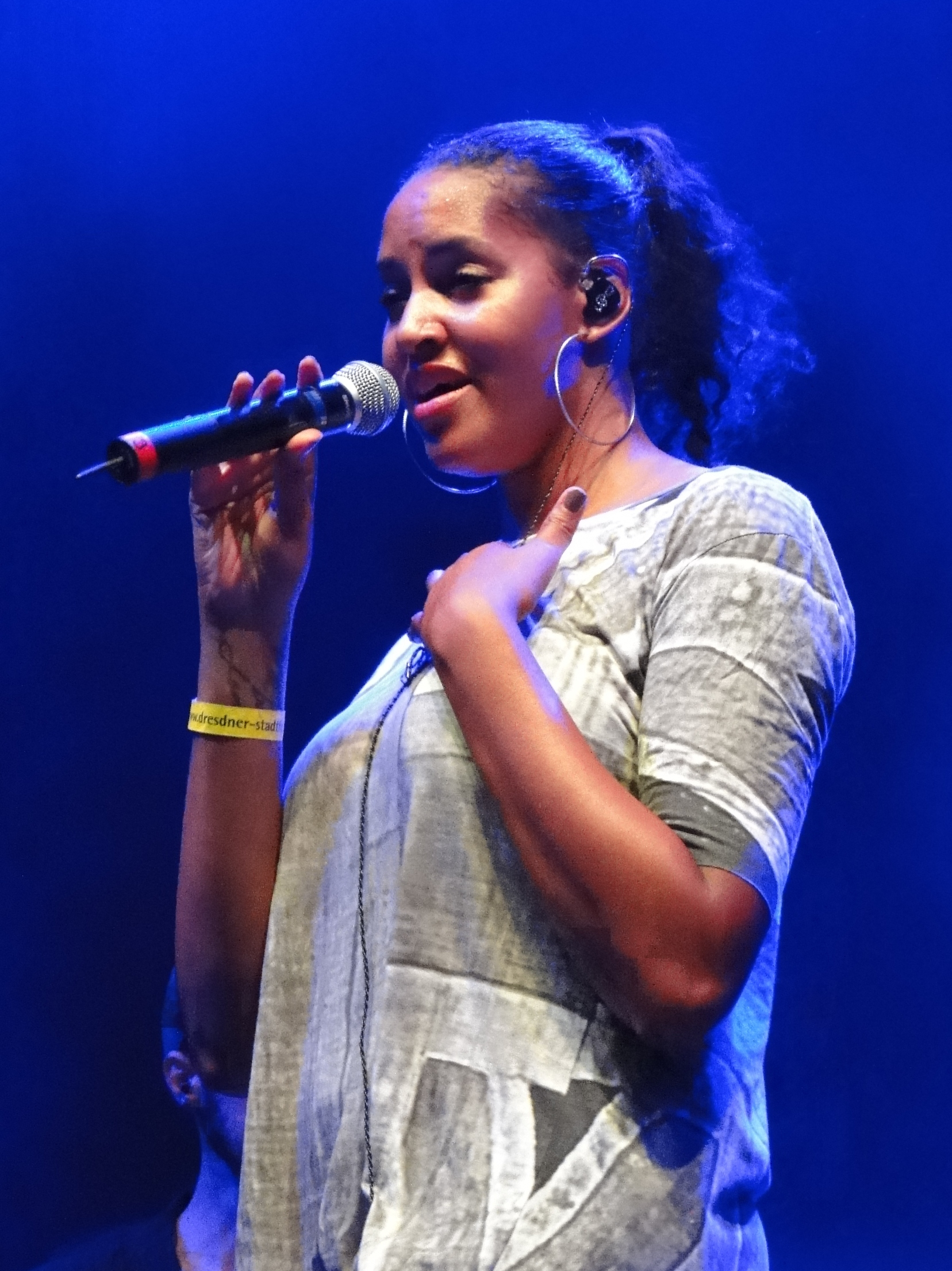 Die deutsche Sängerin Cassandra Steen während eines Auftrittes in Dresden 2011